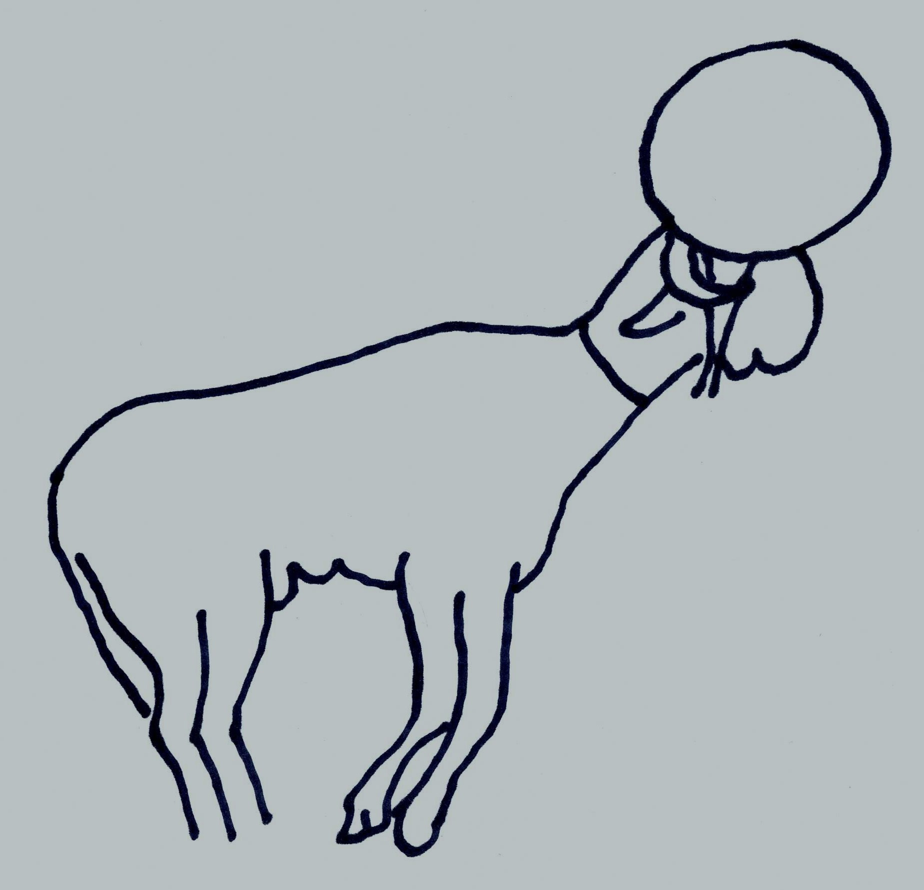 Gravure préhistorique de Hadjrat Sidi Boubakeur, région de Djelfa, Algérie, croquis schématique (bélier)